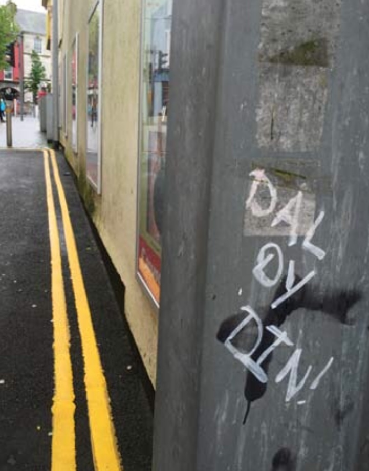 One of a number of examples of Welsh language graffiti illustratin an interest in language and grammar